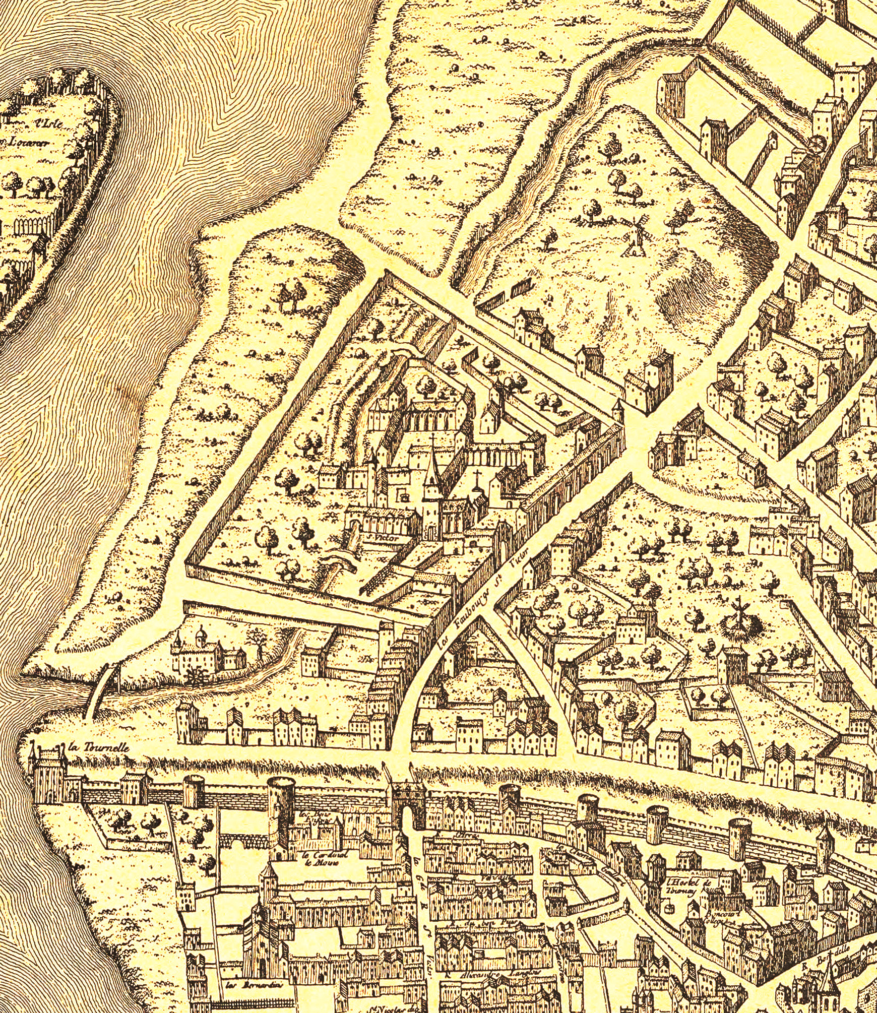 Extrait du plan de Paris au XVIe siècle publié par Guillaume Dheulland (17..?-177.) en 1756. Publié en 1907 par A. Taride. Fonds BnF. En bas les murs de Paris, à gauche, la Tournelle et le moulin de la Bièvre, l'enceinte de l'Abbaye Saint-Victor traversée par la Bièvre, les faubourgs Saint-Victor, le moulin d'Ivry sur sa butte, en haut à droite.